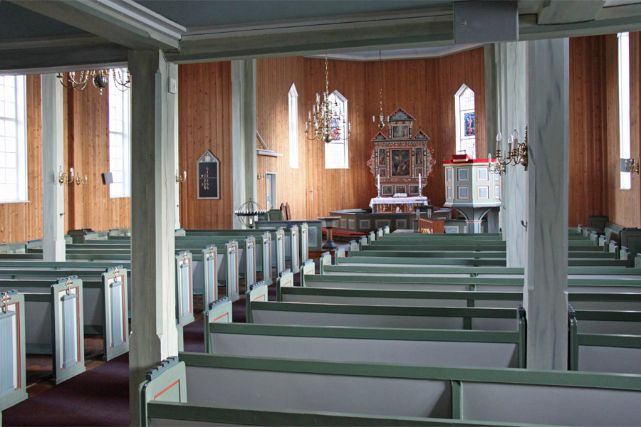 Norsk (nynorsk): Odda kyrkje interiør